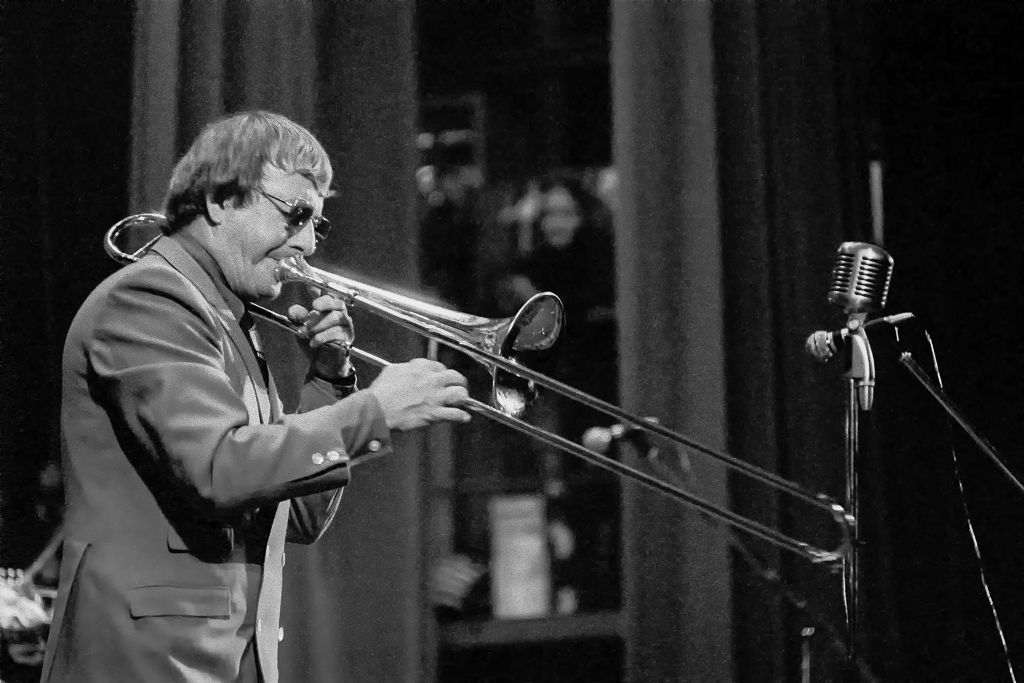 Kai Winding The Giants of Jazz, Sigma 7